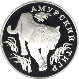 Амурский тигр, памятная серебрянная монета Банка России